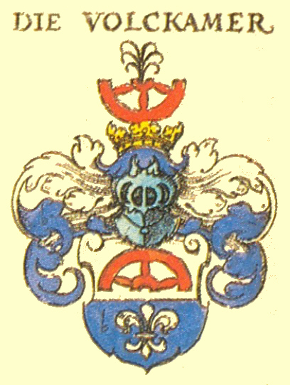 Wappen der Nürnberger Patrizierfamilie Volckamer von Kirchensittenbach